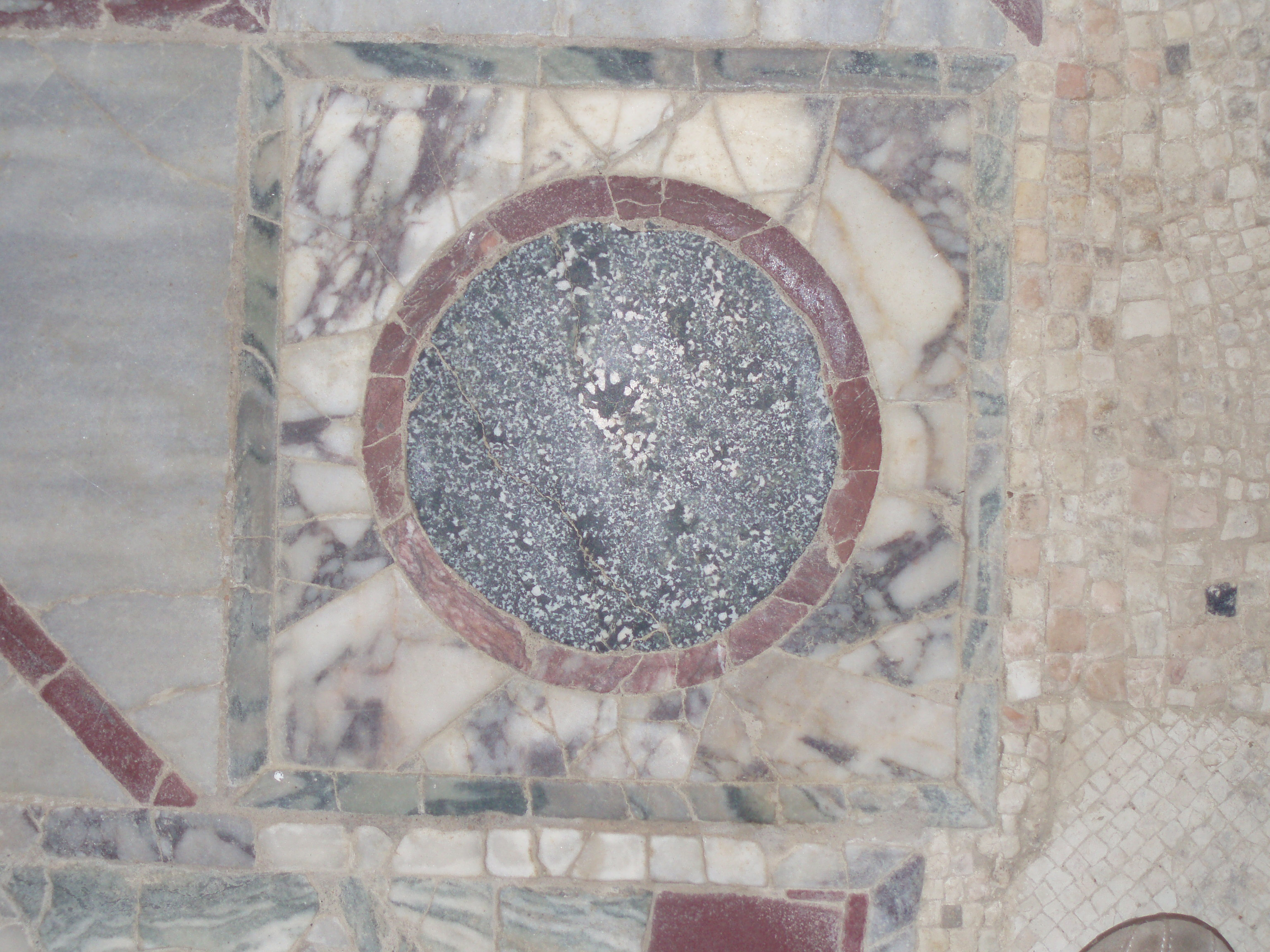 Suasa, Domus dei Coiedii, Opus sectile, particolare 2.JPG